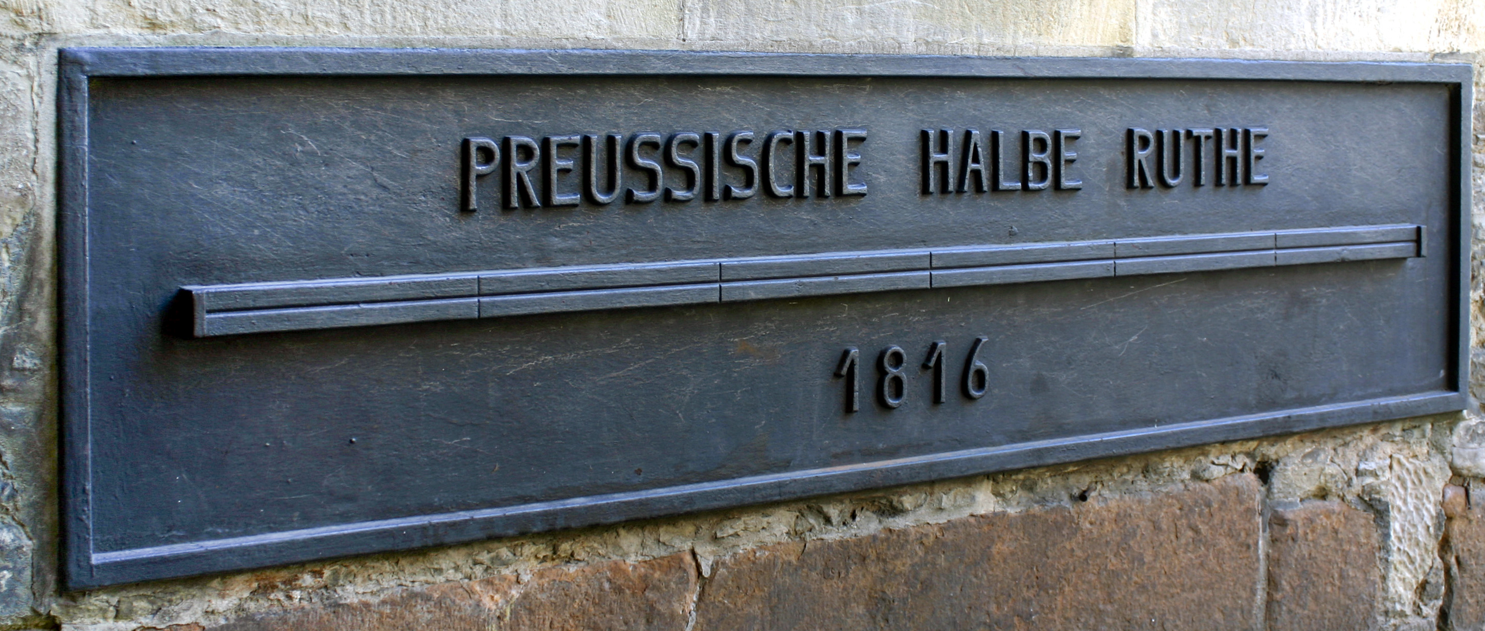 Münster, Historisches Rathaus, Preussische Halbe Rute